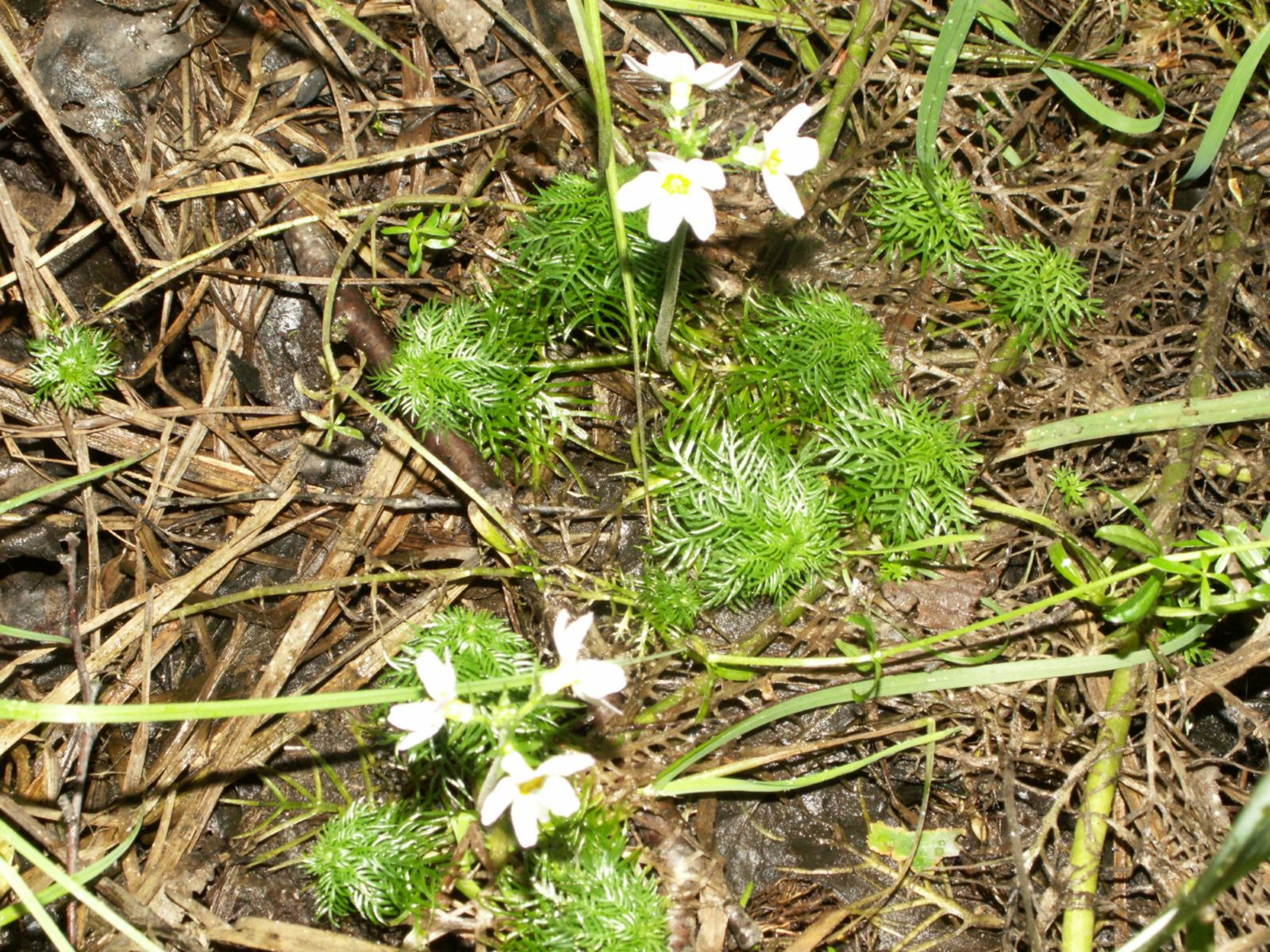 Hottonia palustris in ausgetrocknetem Sumpfland, Miniaturblaetter im Trockenen